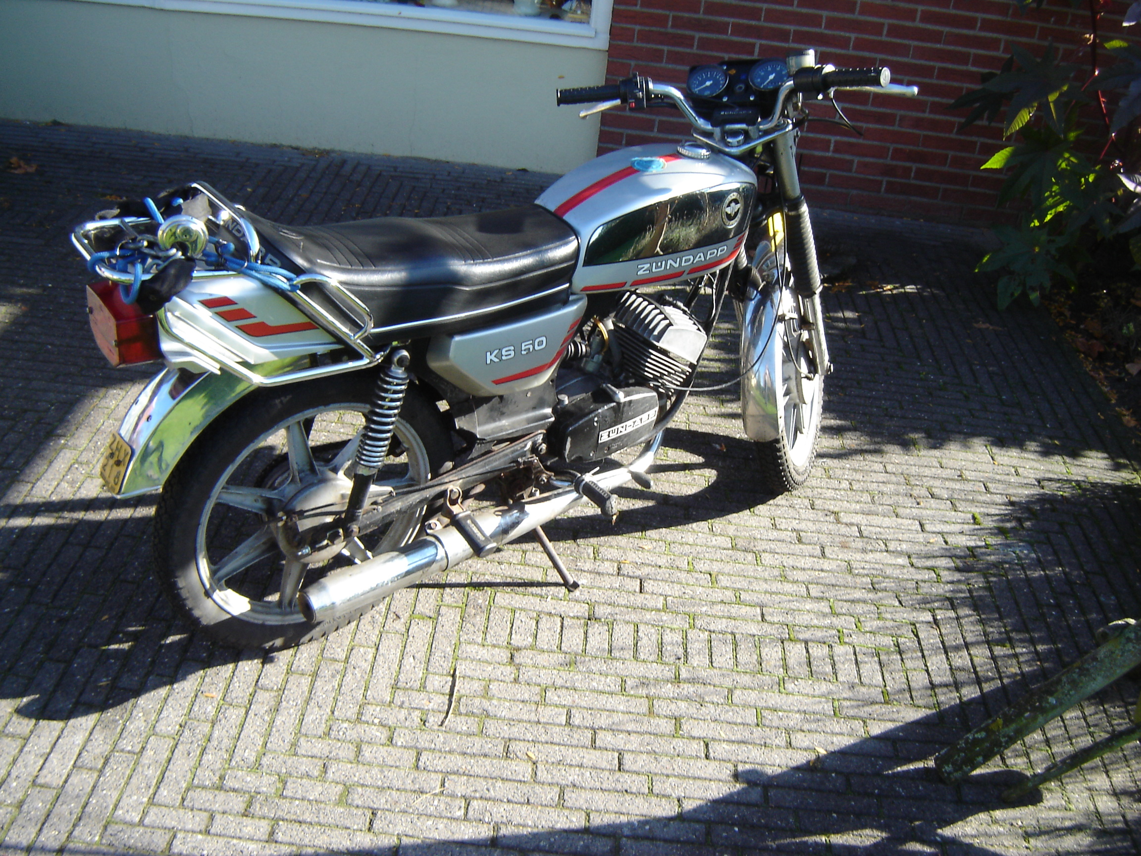 Een Zundapp type 529, herkenbaar aan zijn verchroomde tank met een inhoud van 13 liter